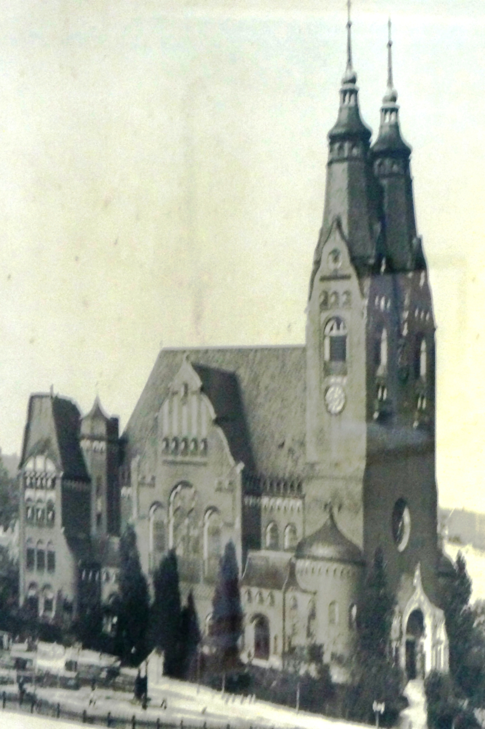 Fotografie einer historischen Aufnahme, die sich im Gemeindebüro befindet